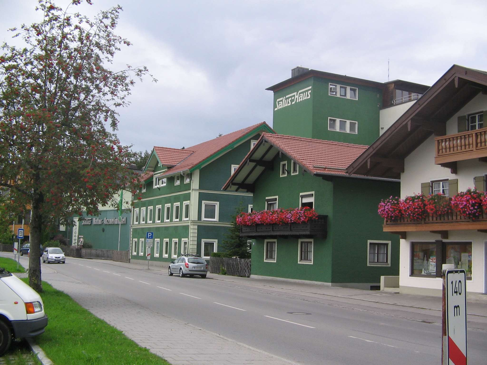 Salus-Haus in Bruckmühl